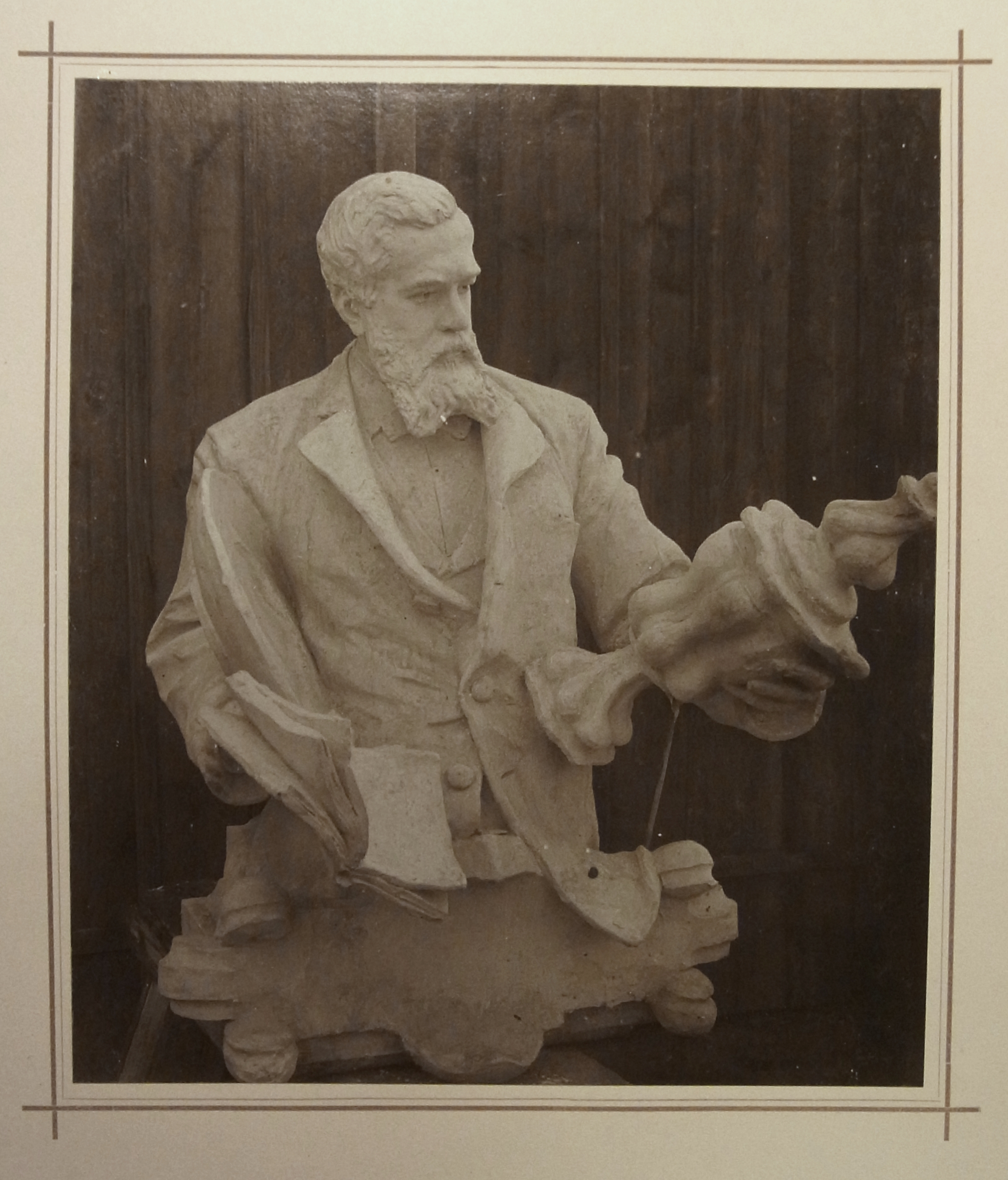 Gipsmodell für die Figur des Gelehrten Prof. Justus Brinckmann